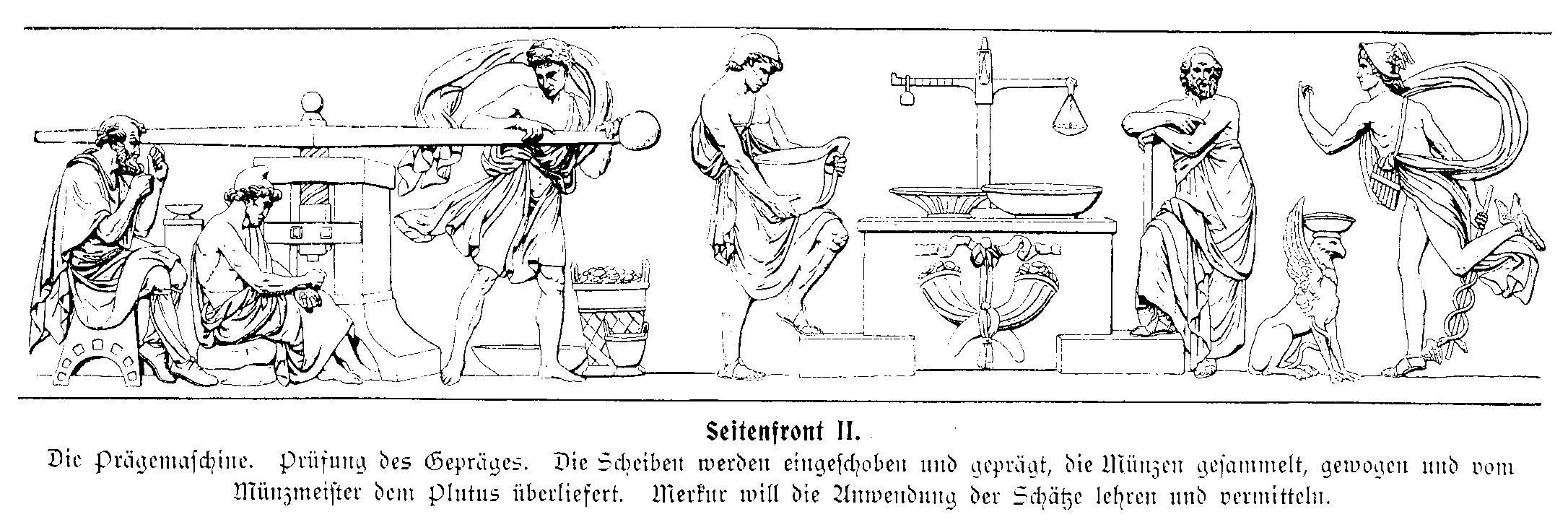 Der Münzfries von Johann Gottfried Schadow, Teil 4.